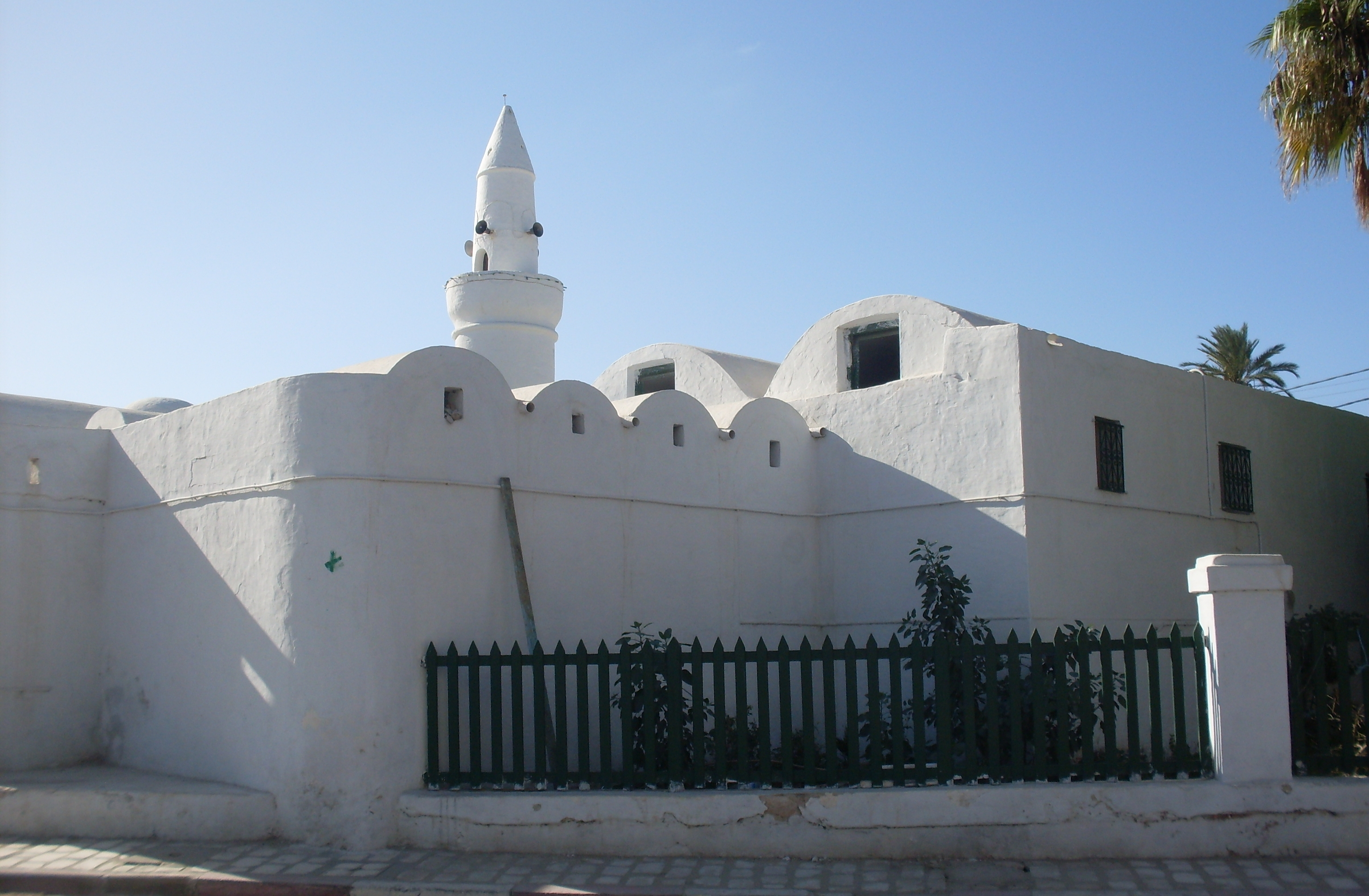 Tunisie, Jemaa Ettruc, Djerba